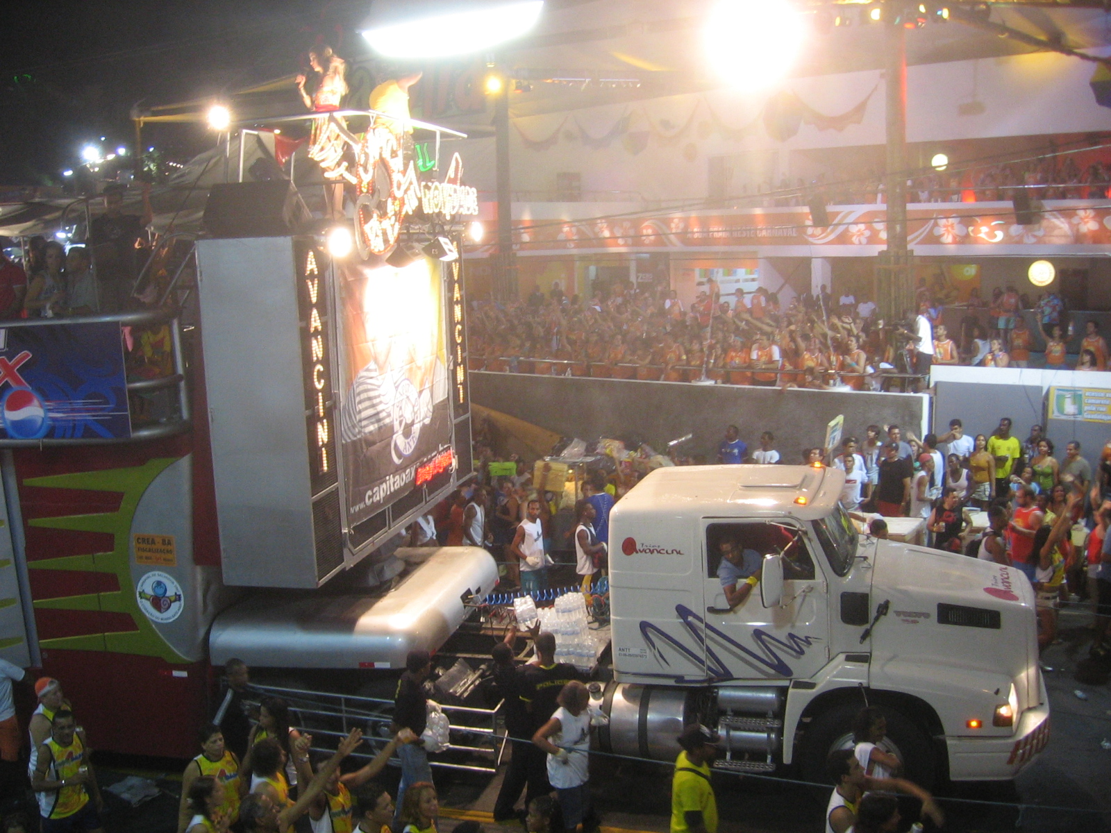 Trio Electrico (Carnaval de Salvador 2007)